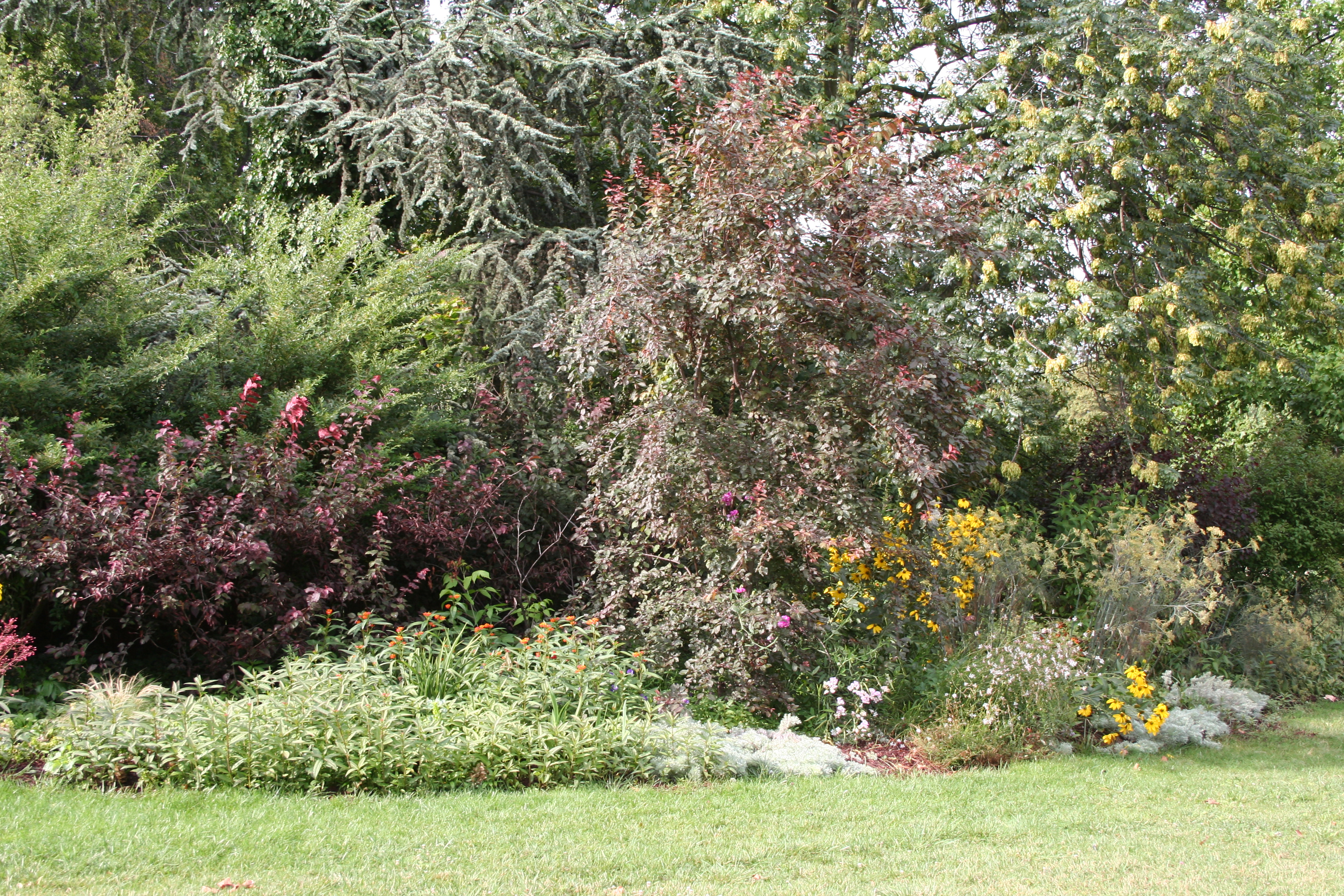 Bois de Vincennes, Paris, France.